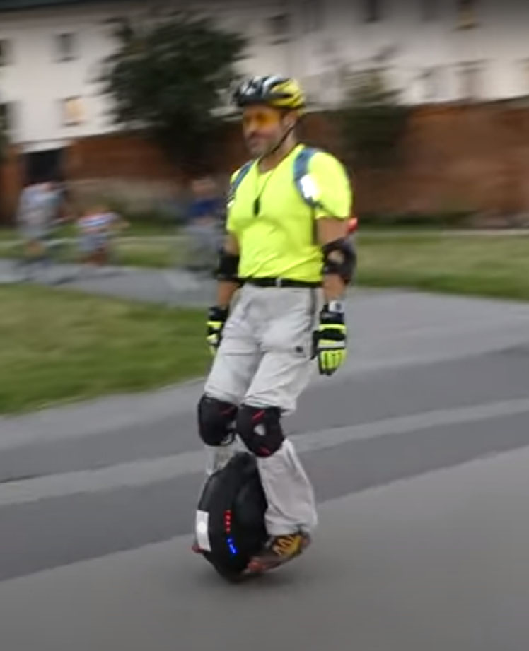 monociclo elettrico autobilanciato in movimento